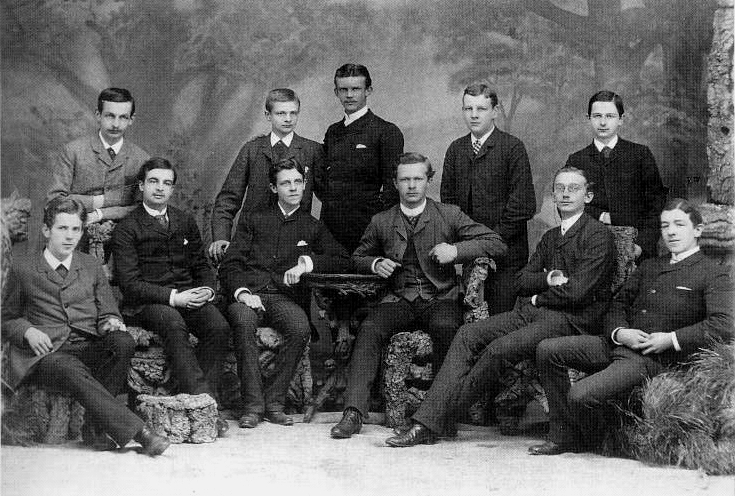 Der Bremer Prima-Verein 1887 (stehend rechts außen: Karl Hampe, 2. von links: Andreas Gildemeister, sitzend: 3. von links: Hermann Schumacher)